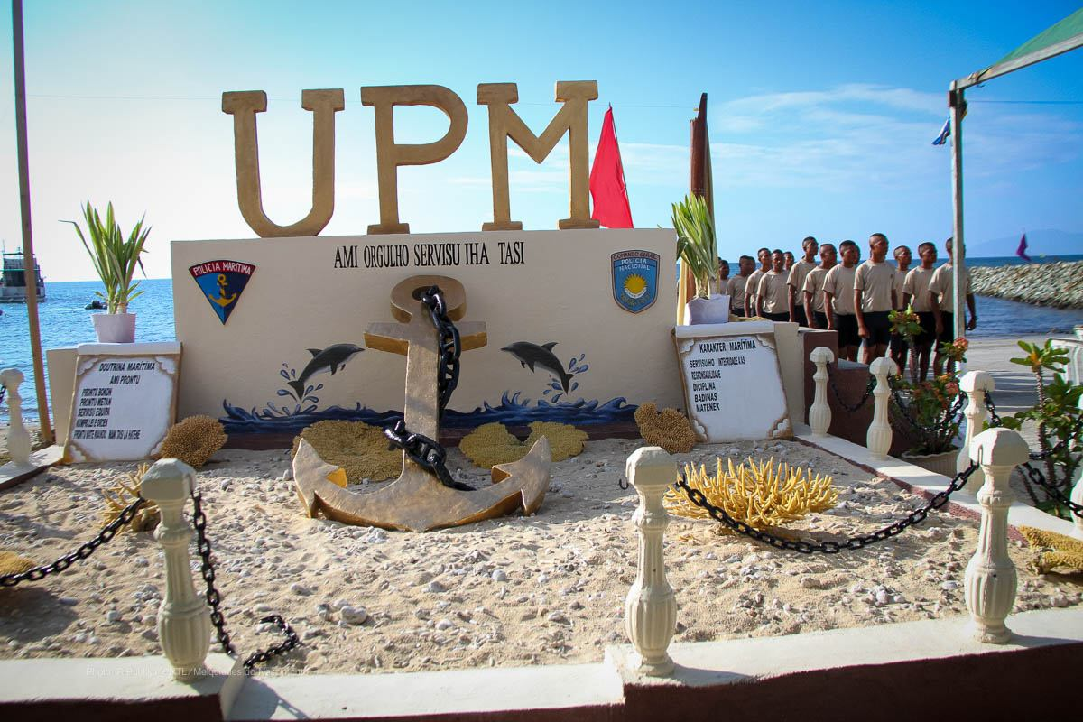 Hauptquartier der Unidade da Polícia Marítima